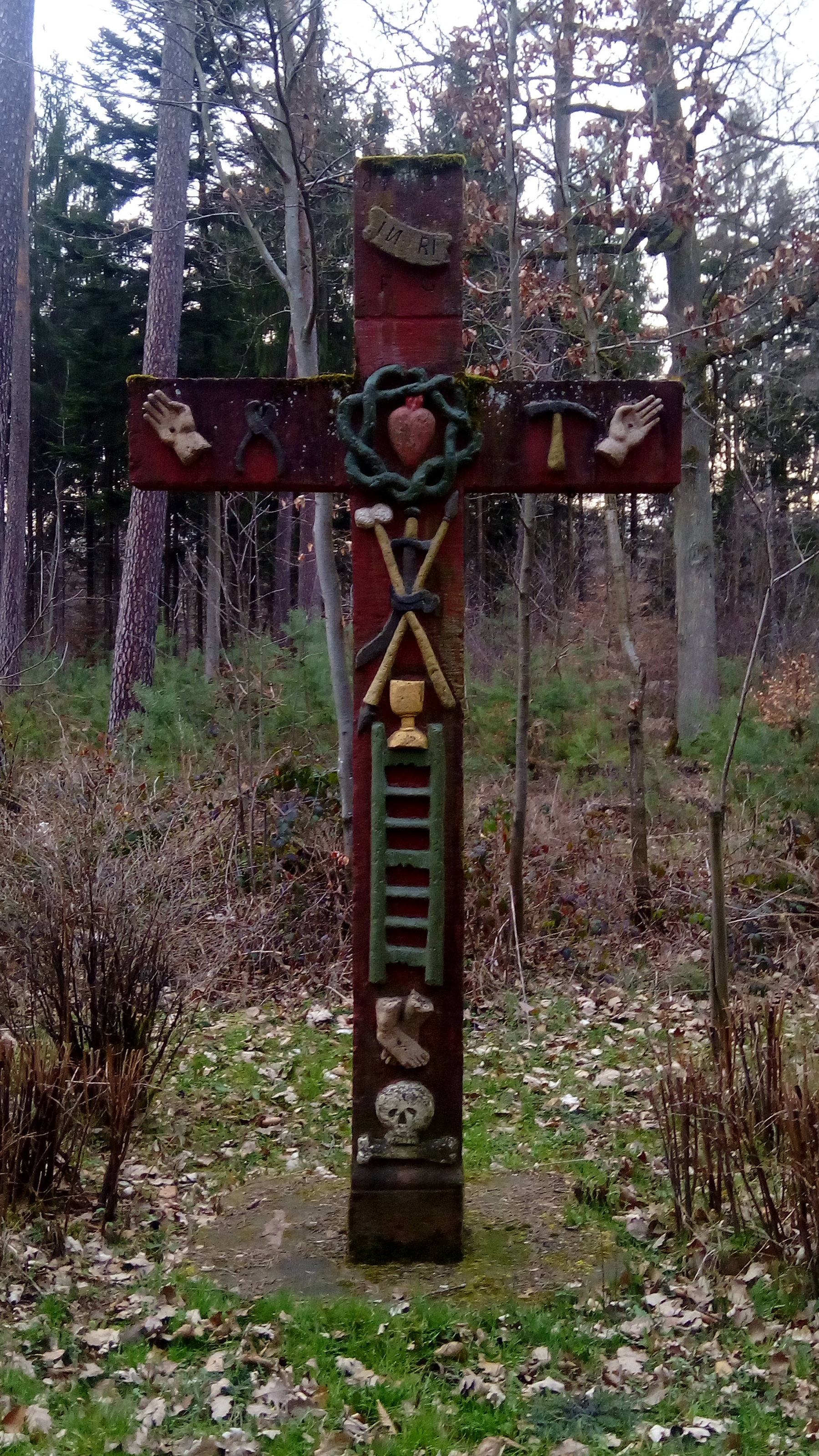 Wegekreuz zwischen Walldürn und Glashofen